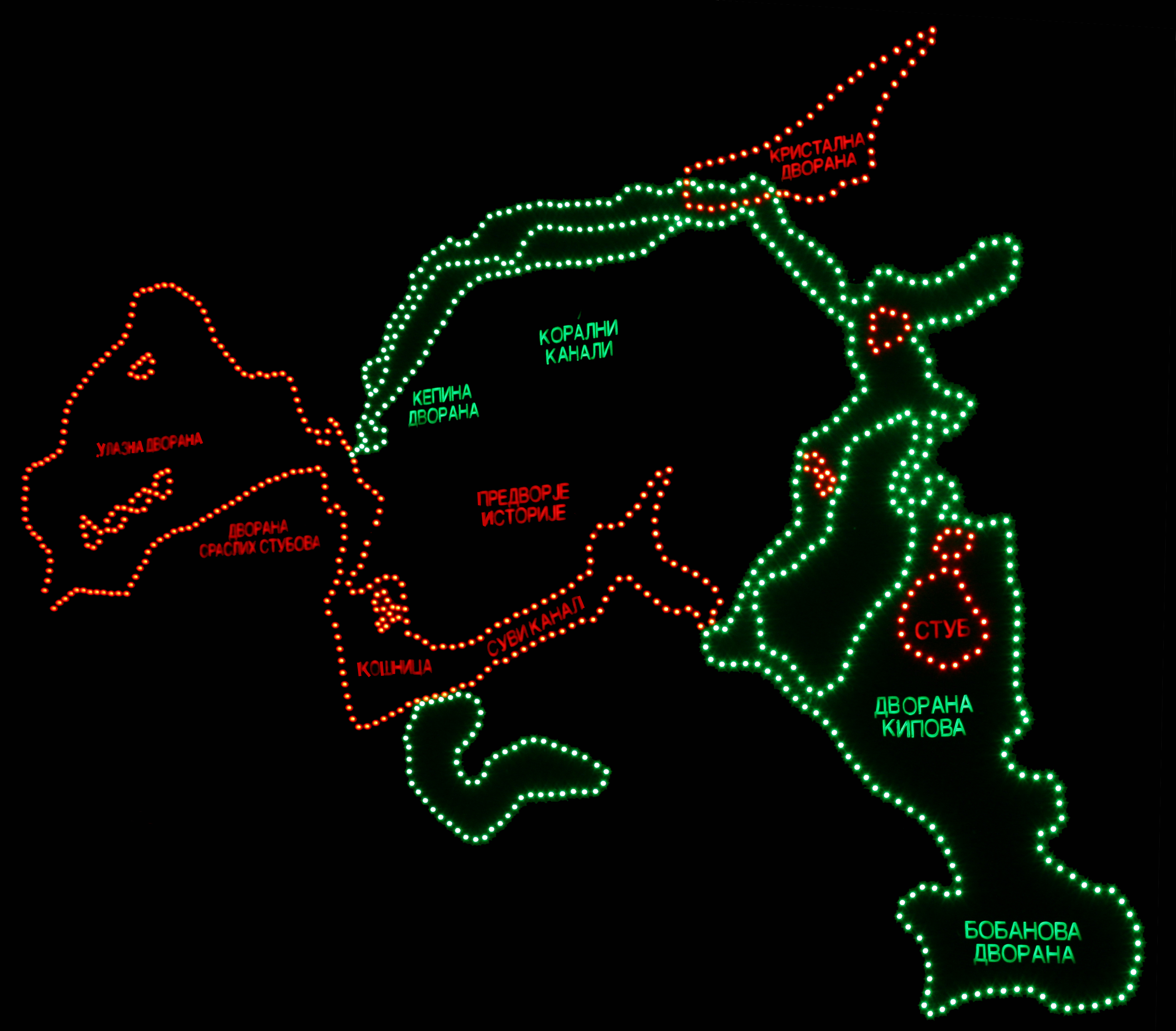 План Ресавске пећине, на улазу